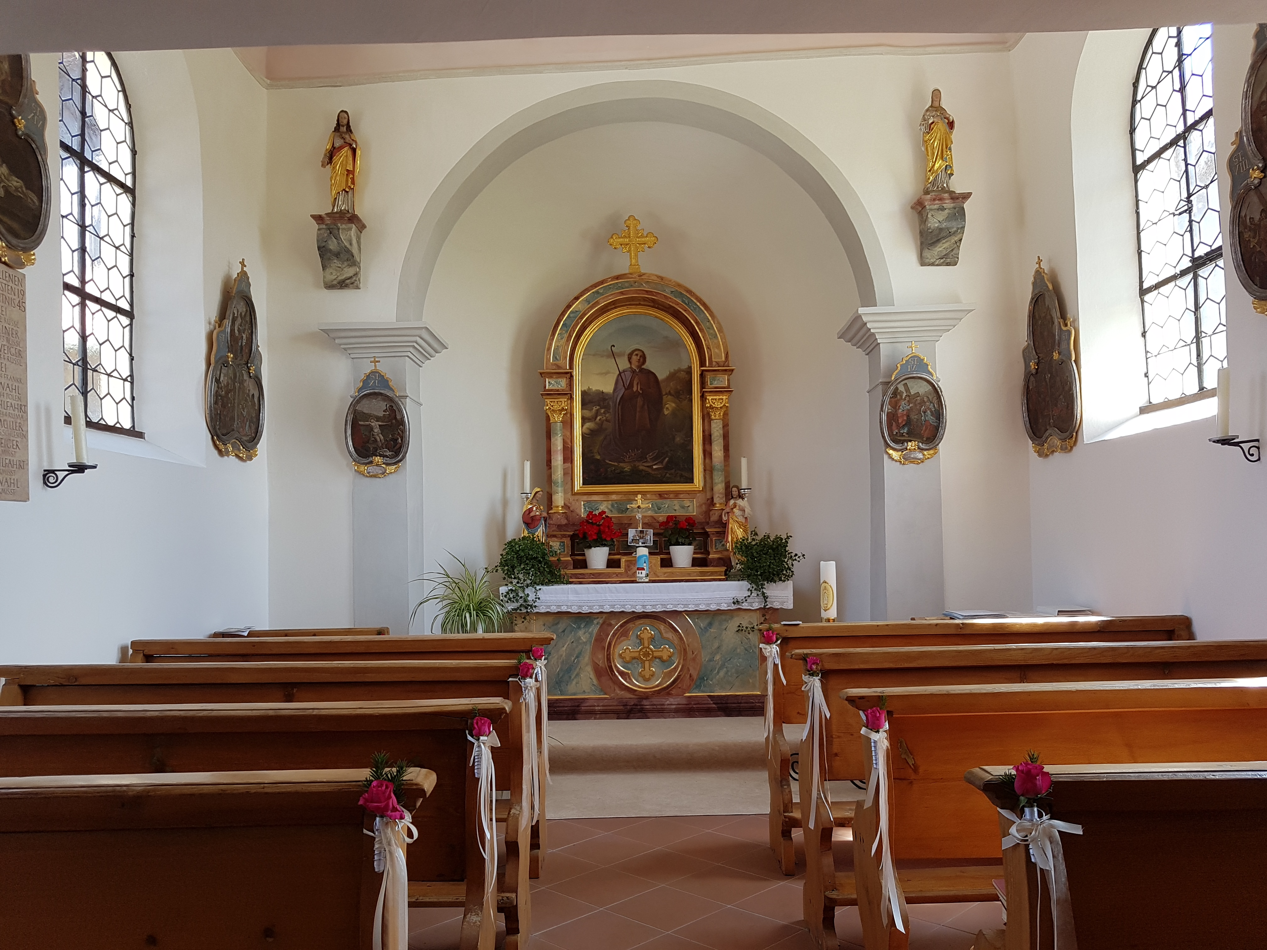 Kapelle